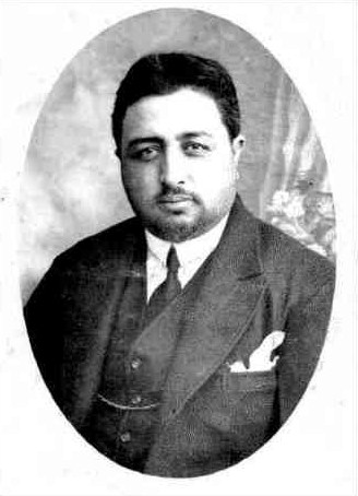 King Inayatullah Khan of Afghanistan